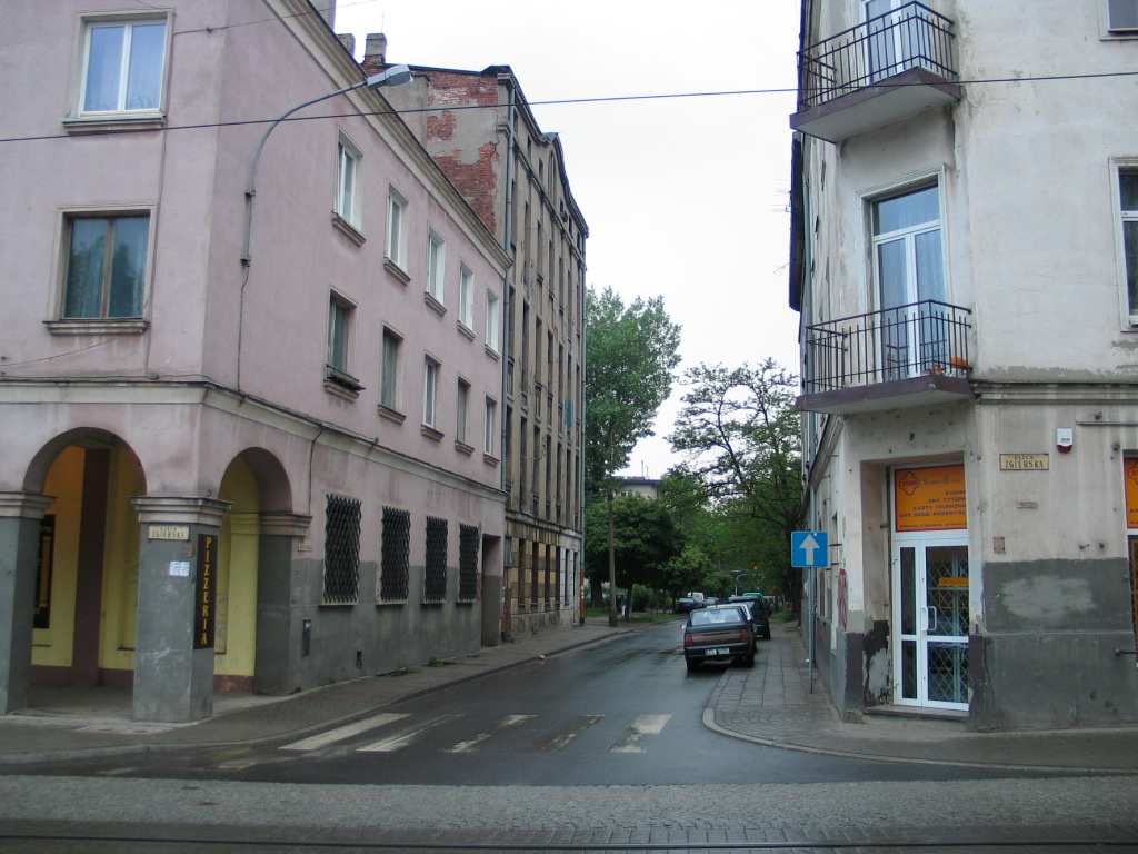 Ulica Drewnowska w Łodzi